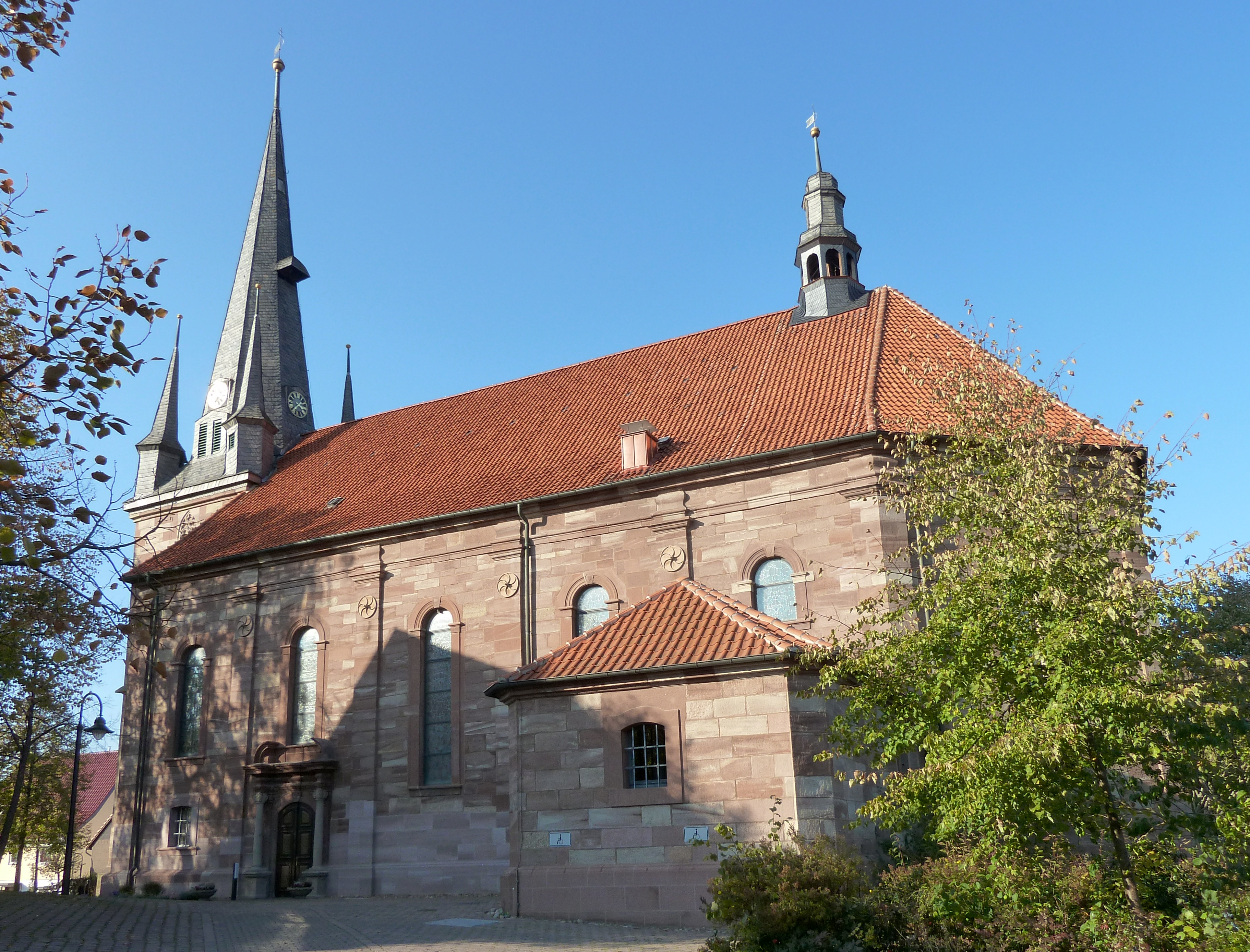 Katholische Pfarrkirche St. Cosmas und Damian in Bilshausen, Südniedersachsen. Erbaut 1781-83 durch den Maurermeister Johann Burchardt aus Nesselröden